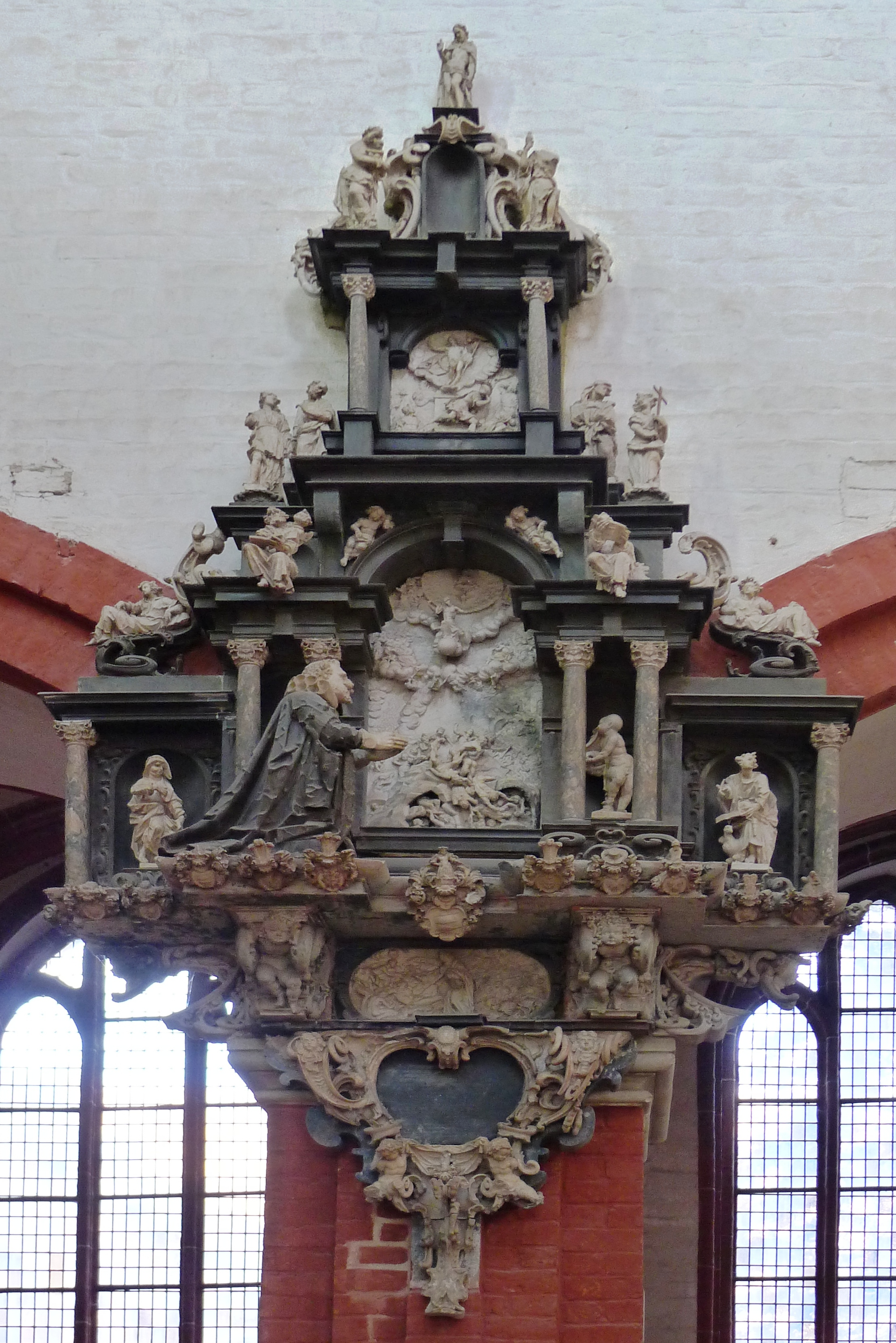 Epitaph im Dom für Adam von Königsmarck (†1621) (Christoph Dehne zugeschrieben, ein Hauptwerk des Manierismus in Brandenburg. Gestaffelter architektonischer Aufbau aus verschiedenfarbigem Marmor mit verkröpften Säulengliederungen, Ohrmuschelwerk und vielfigurigen Alabasterreliefs: in der Mitte Weltgericht, davor der Verstorbene im Gebetsgestus, darüber Auferstehung, am Sockel über reich gerahmter Vitentafel Ezechiel im Tal der Knochen. In seitlichen Nischen und auf dem Gebälk Figuren Christi und der Evangelisten, der drei theologischen und der vier Kardinaltugenden sowie Putten.)